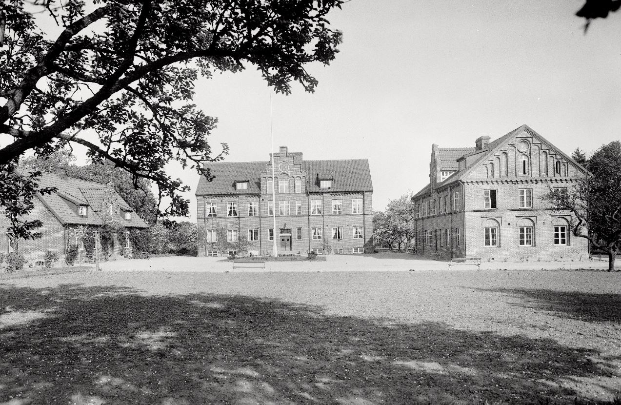 Råby räddningsinstitut utanför Lund. Till vänster matsalsbyggnaden, i mitten nytt skolhus byggt 1925, till höger ursprunglig byggnad från 1840.